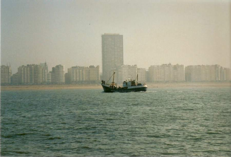 Vu d'Ostende